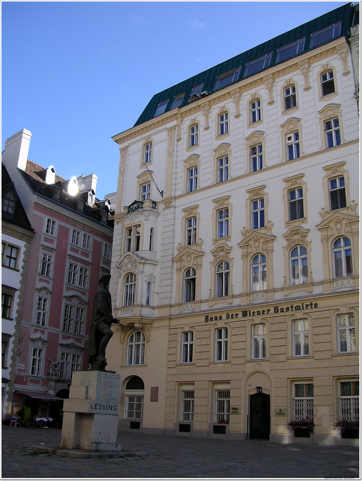 Bécs 23